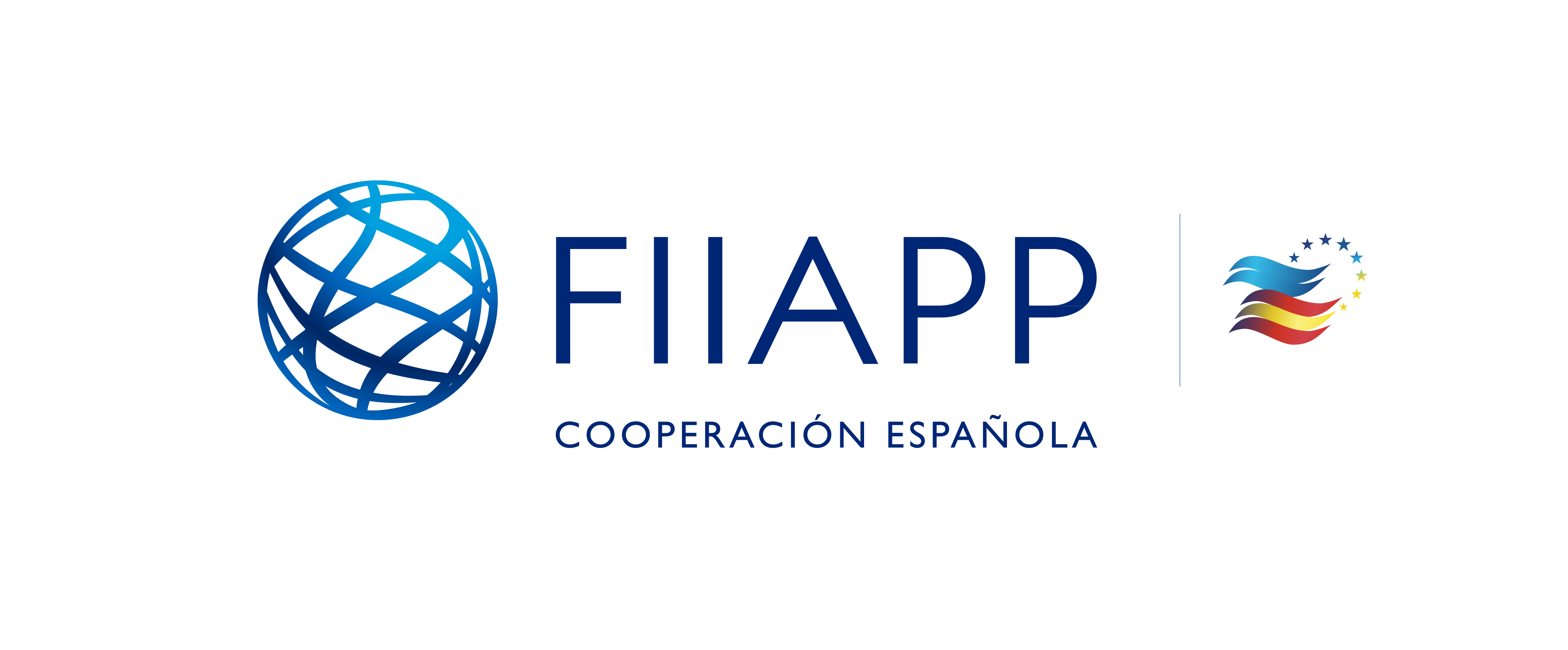 Logotipo FIIAPP